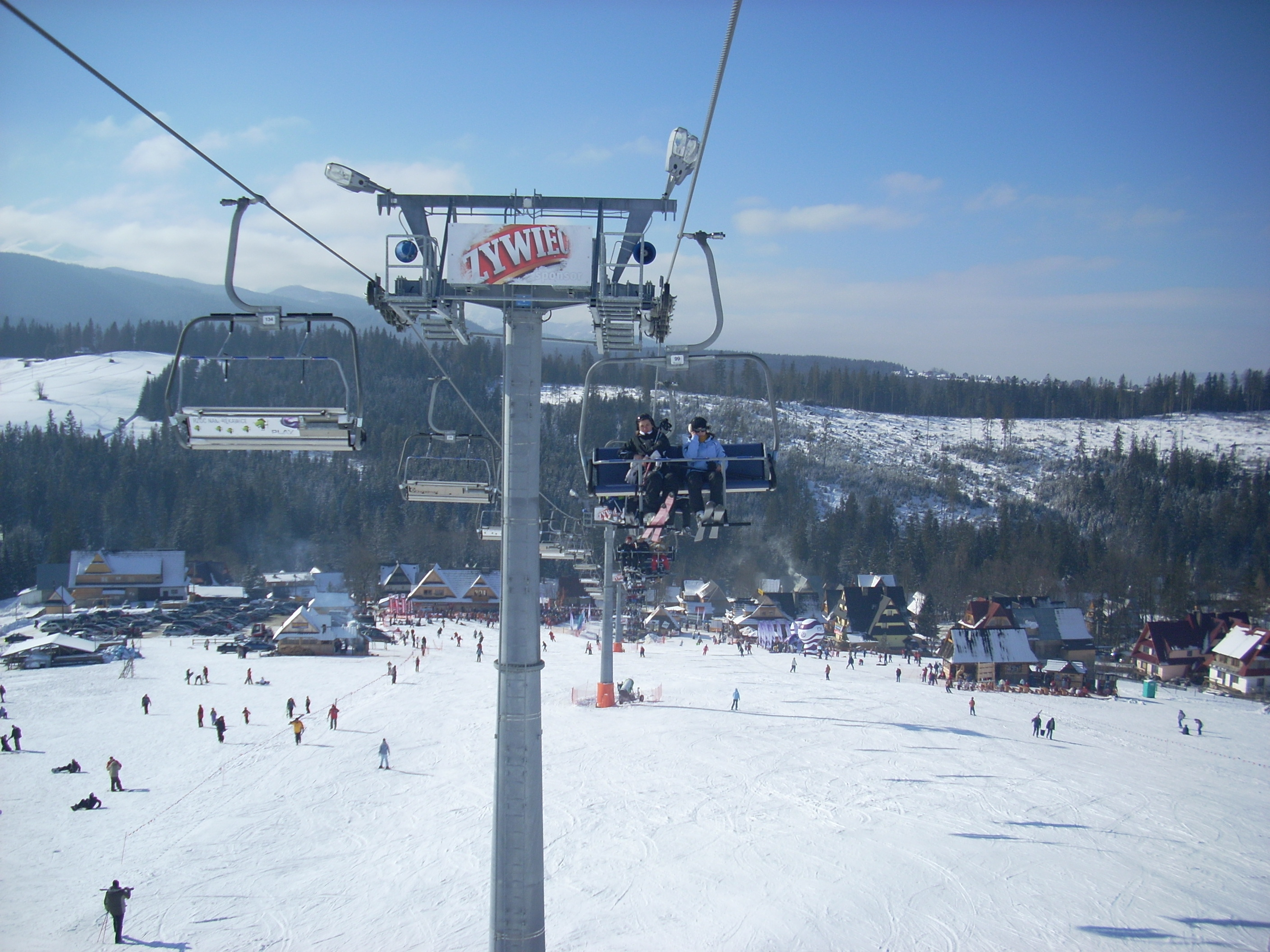 Małe Ciche, wyciąg narciarski (en Male Ciche ski lift)